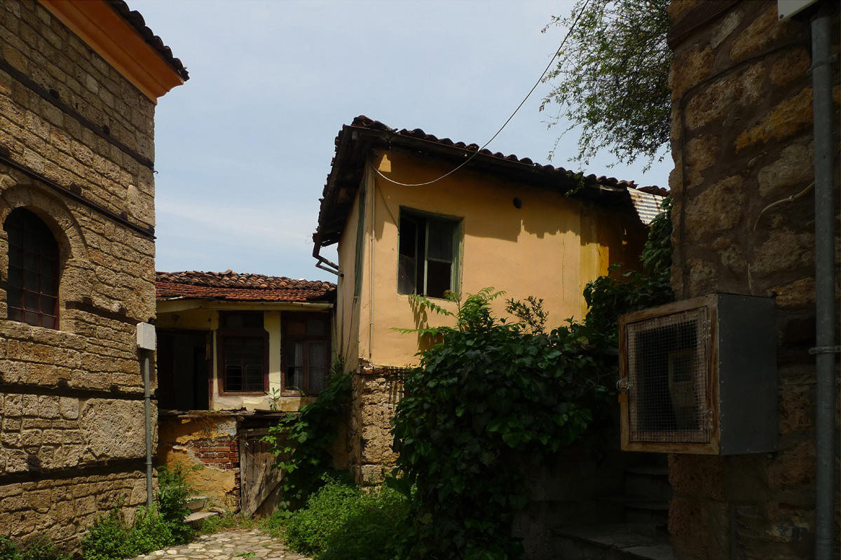 Barbouta the former Jewish quarter of Veria